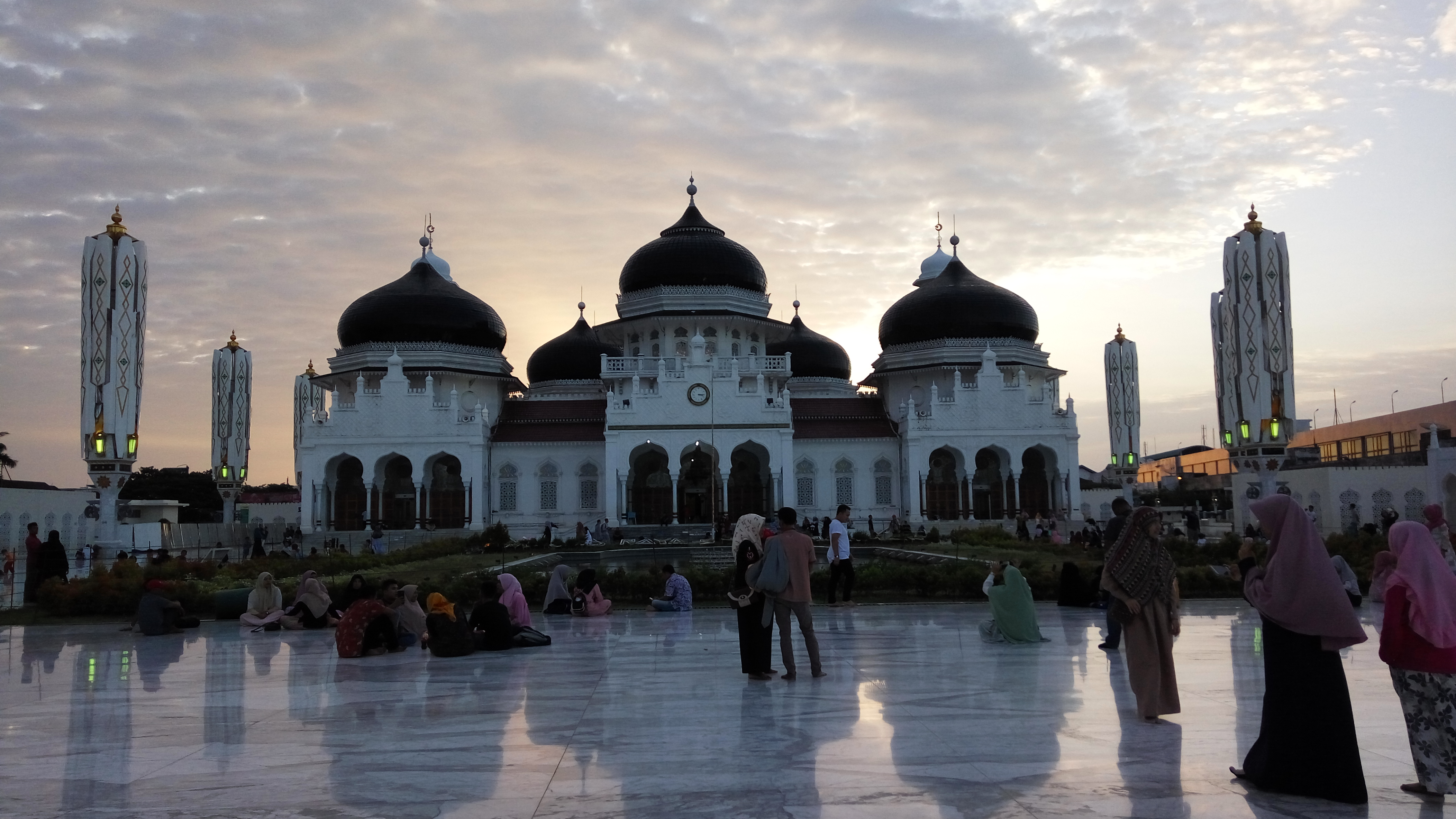 Baiturrahman Grand Mosque in Banda Aceh, Aceh